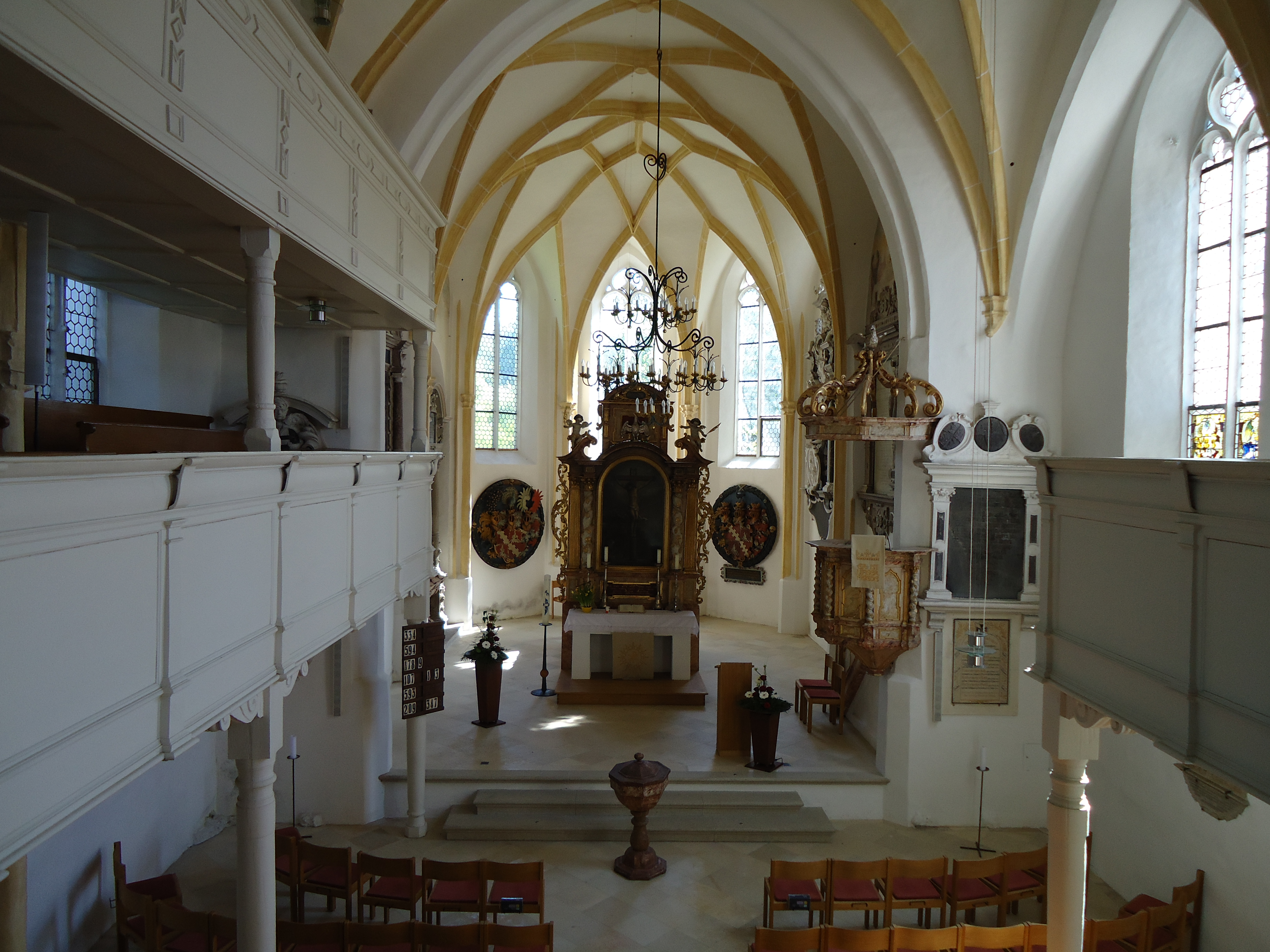 Blick ins Kirchenschiff der evangelischen Marktkirche